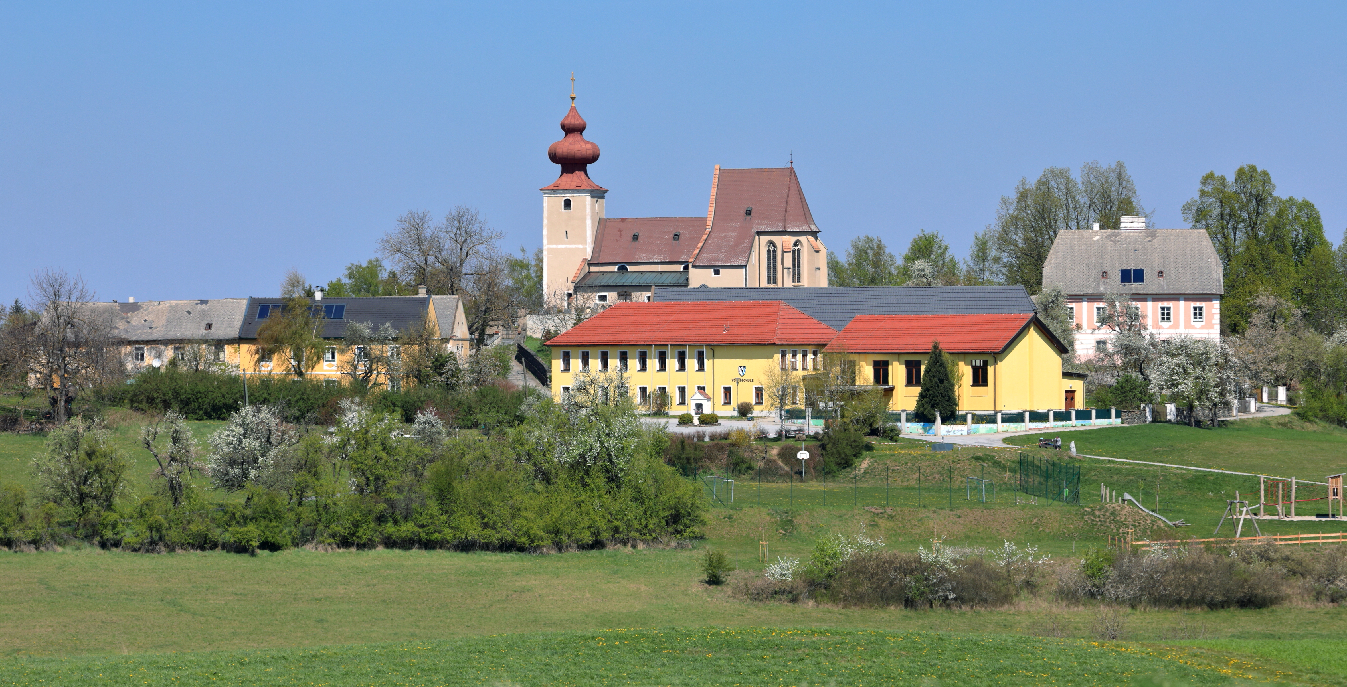 Südansicht des Kirchenweilers Sankt Johann in Großheinrichschlag, ein Ortsteil der niederösterreichischen Gemeinde Weinzierl am Walde.Die weithin sichtbare röm.-kath. Pfarrkirche von Großheinrichschlag ist dem hl. Johannes der Täufer geweiht. Der mächtige mittelalterliche Turm mit wuchtigem, barockem Zwiebelhelm ist der Westfront vorgestellt und der stark überhöhte Chor im Osten wurde in der 2. Hälfte des 15. Jahrhunderts errichtet.